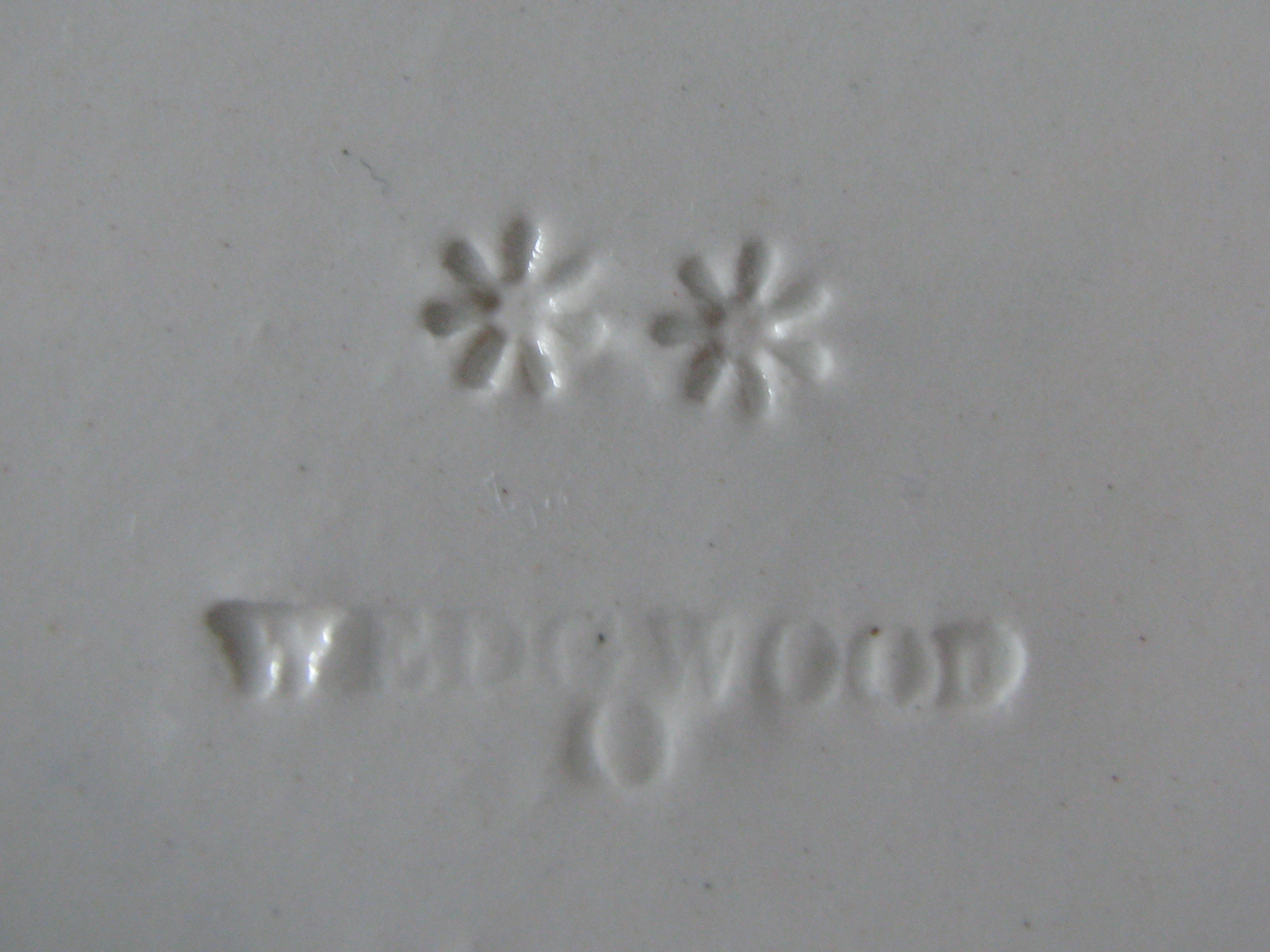 Marchio di stoviglie Wedgwood